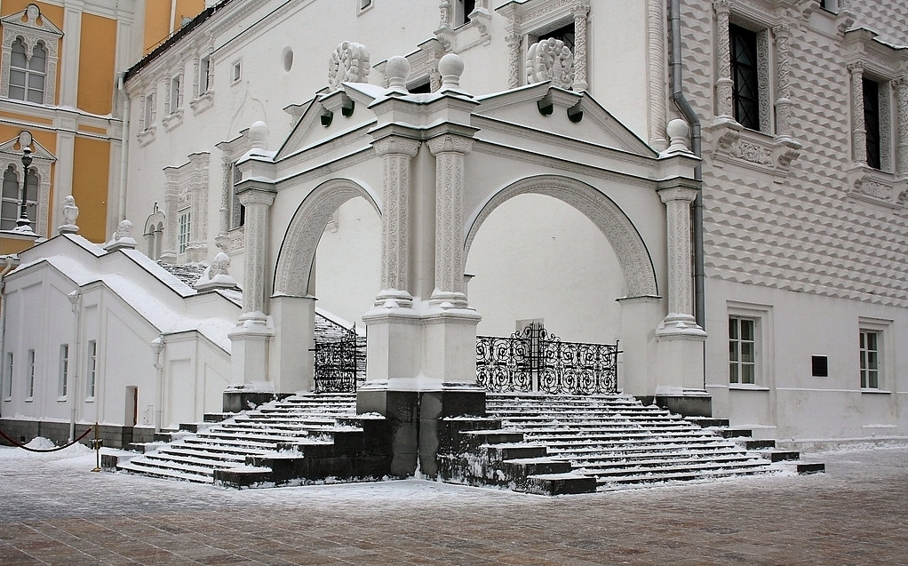 Грановитая палата (Москва и Московская область, Москва, Красная площадь, Кремлевская наб., Александровский сад)